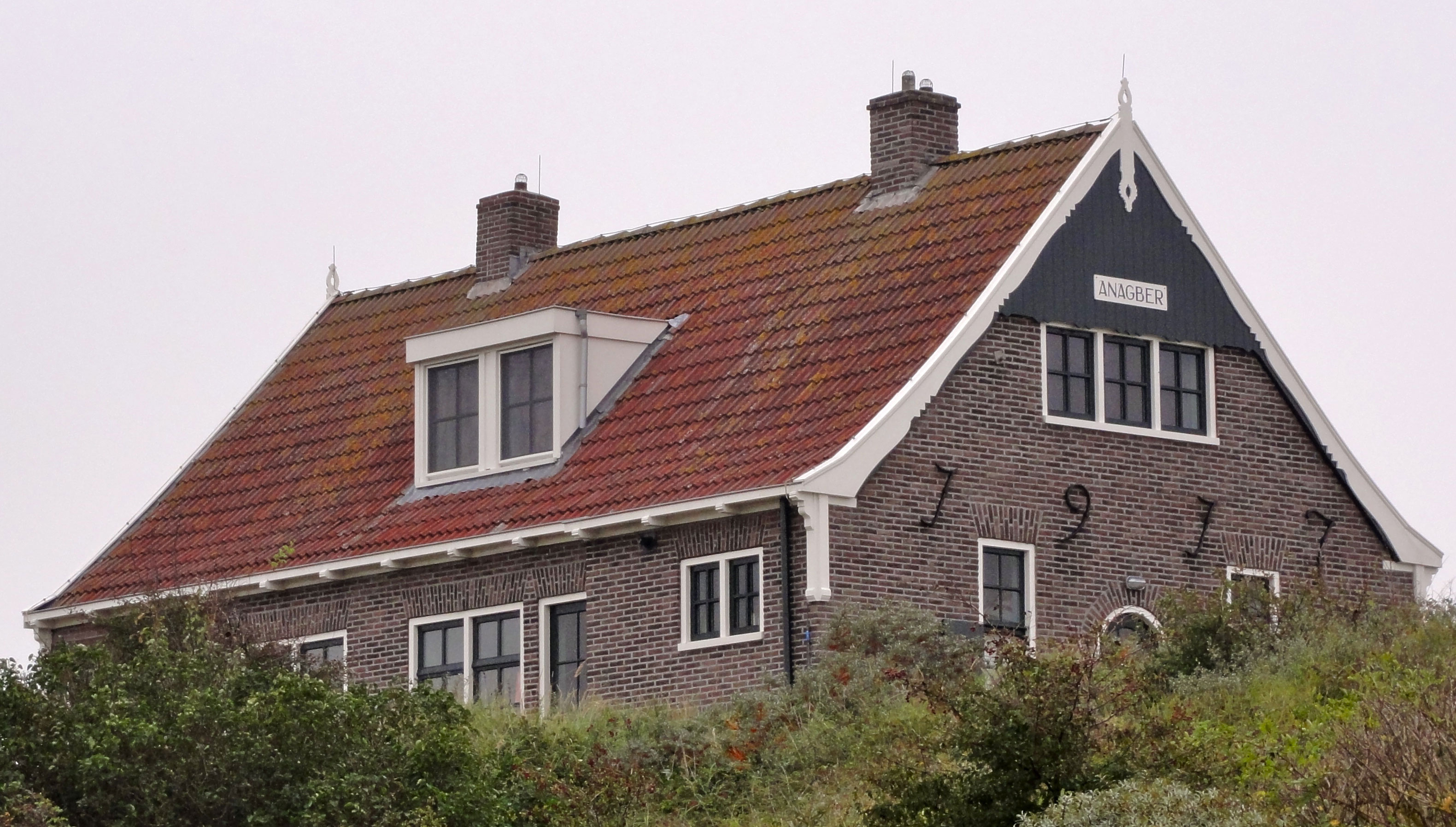 Anagber Badweg 115 in Schiermonnikoog